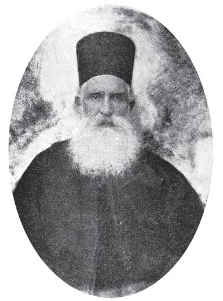 Ангел Константинов (1834 - 1914).